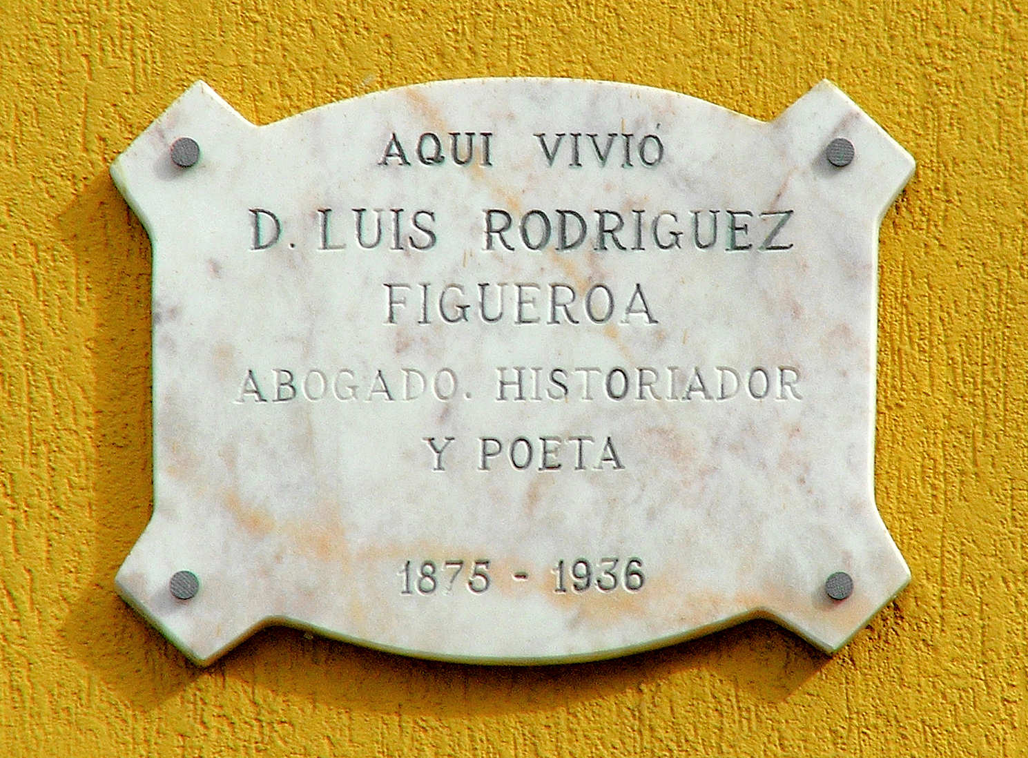 Placa para Luis Rodrígez Figeroa